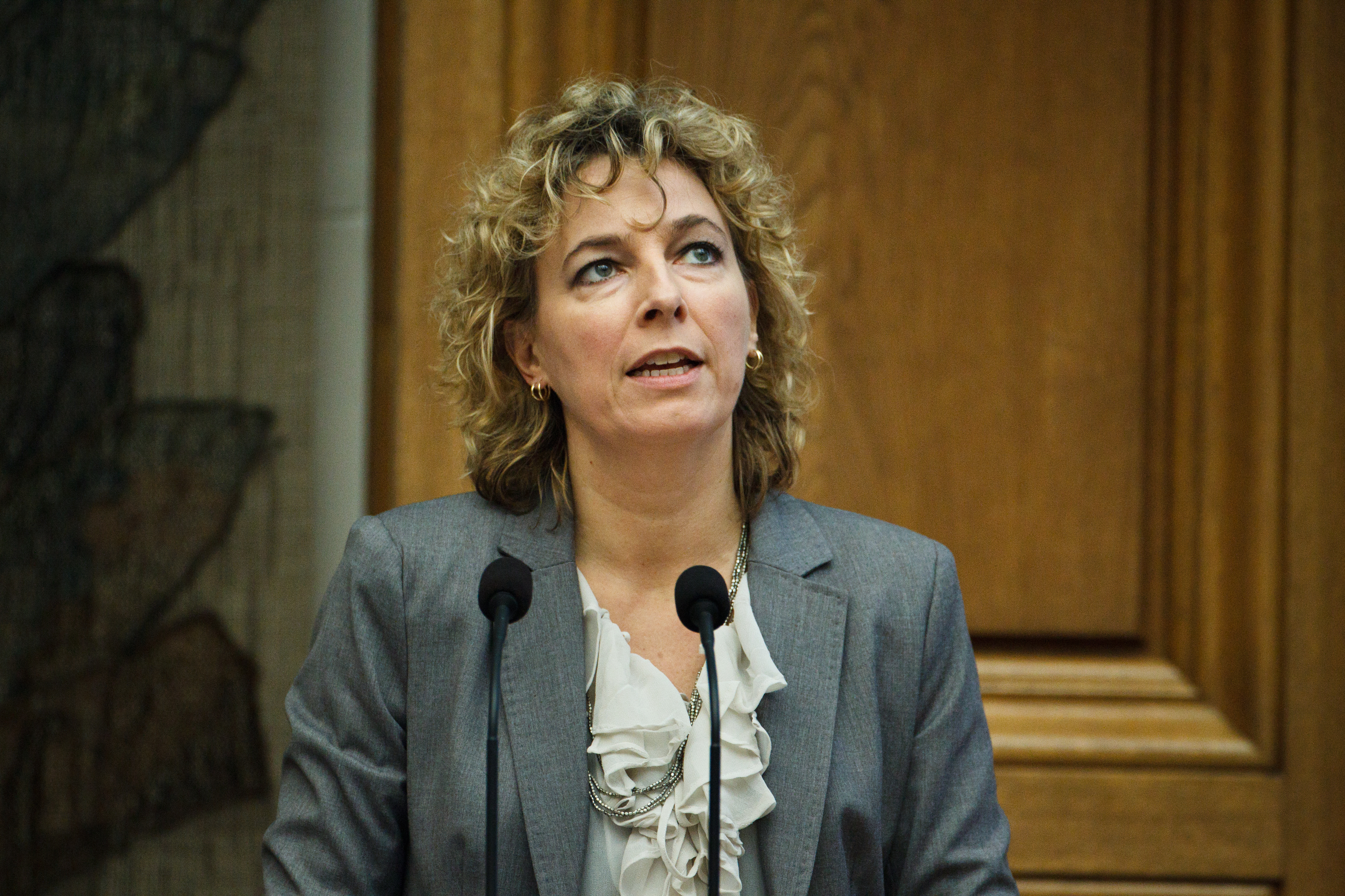 Christine Antorini vid Nordiska Rådets session 2011 i Köpenhamn.